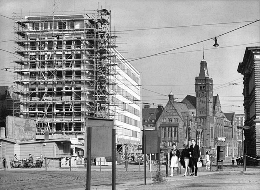 Chemnitz, Ernst-Thälmann-Straße, Hochhaus im Bau, Rathaus Zentralbild Gahlbeck 2.9.1963 Aus der Wahlbilanz des Bezirkes Karl-Marx-Stadt Die Fortschritte des sozialistischen Bauwesens werden beim Aufbau des Stadtzentrums von Karl-Marx-Stadt besonders deutlich.Bereits jetzt prägen die komfortablen Bauten der Magistrale das neue Gesicht der Bezirksstadt. Neben zahlreichen Wohnungsbauten ist auch das Mehrzweckgebäude in der Ernst-Thälmann-Strasse, das mit einem Kostenaufwand von 4,8 Millionen DM errichtet wird, ein in moderner Bauweise geschaffenes Gebäude. UBz: Mehrzweckgebäude in der Ernst-Thälmann-Strasse. Information added by Wikimedia users.retouched version by User:Picandinfo